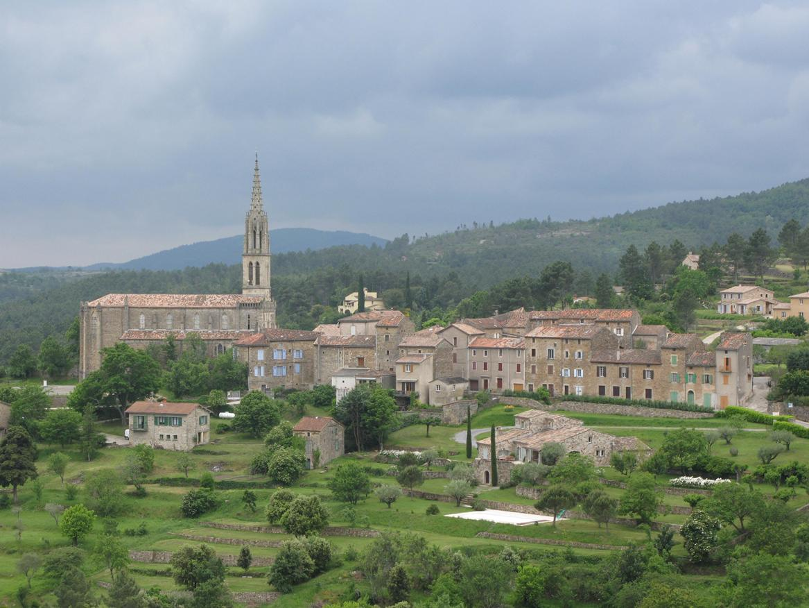 Banne